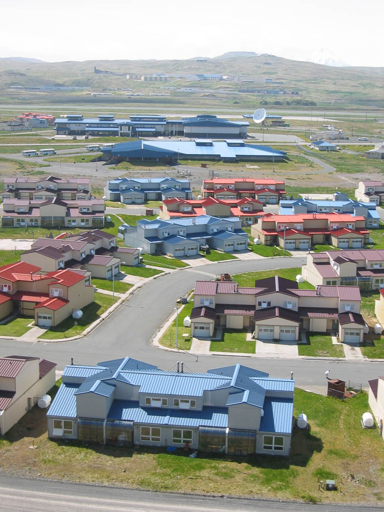 Adak-City, Adak Island, Alaska (U.S.).